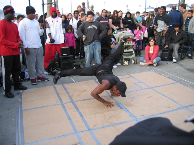 Hip hop street dancing, aka break dancing, in San Francisco.